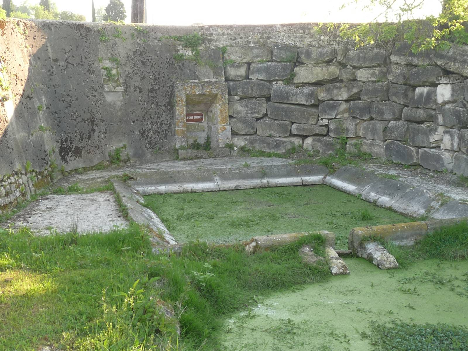 Font Brédot, Touzac, Charente, France